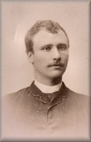 Bildet er tatt i perioden 1890-1899